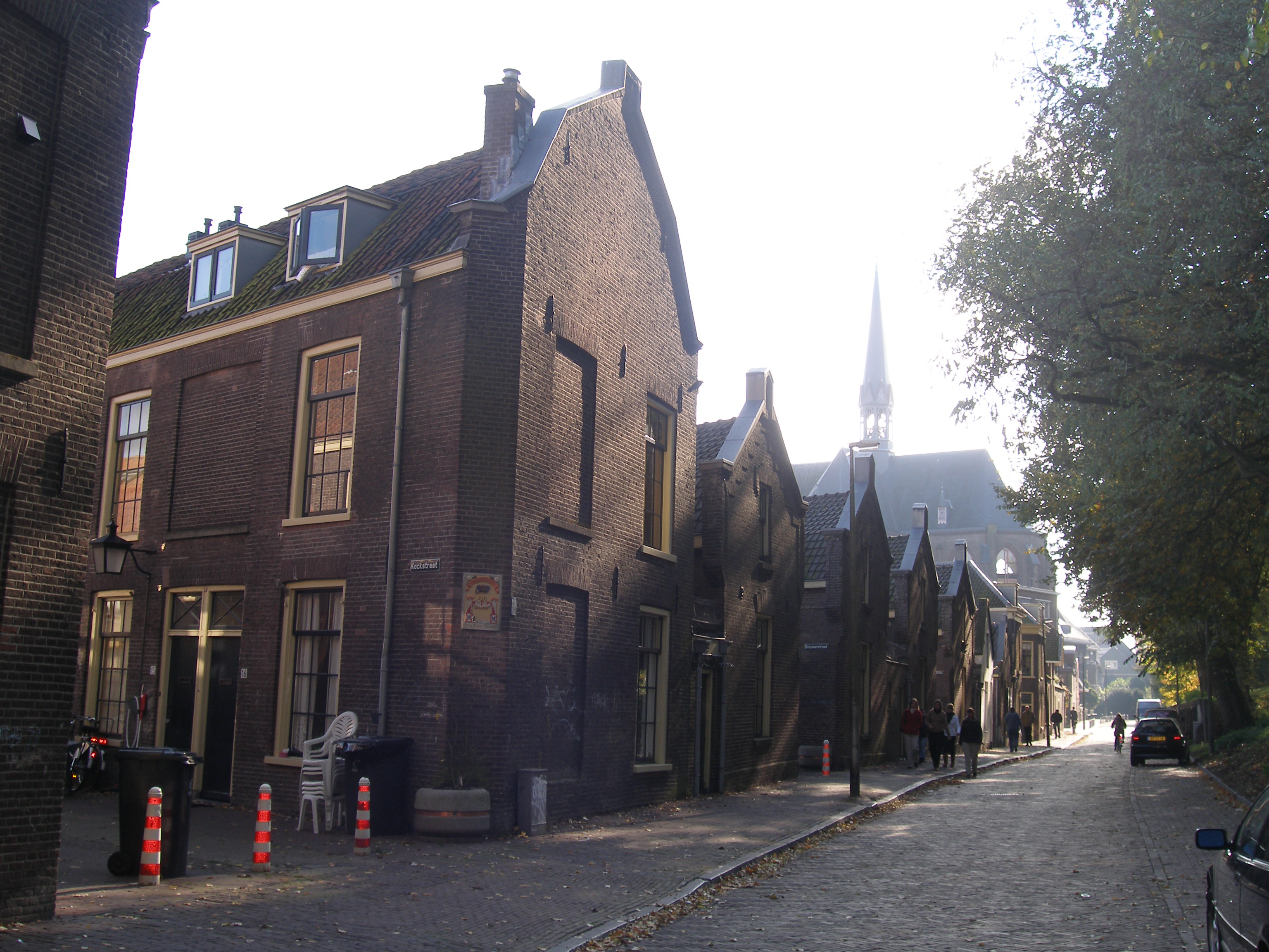 Pelmolenweg